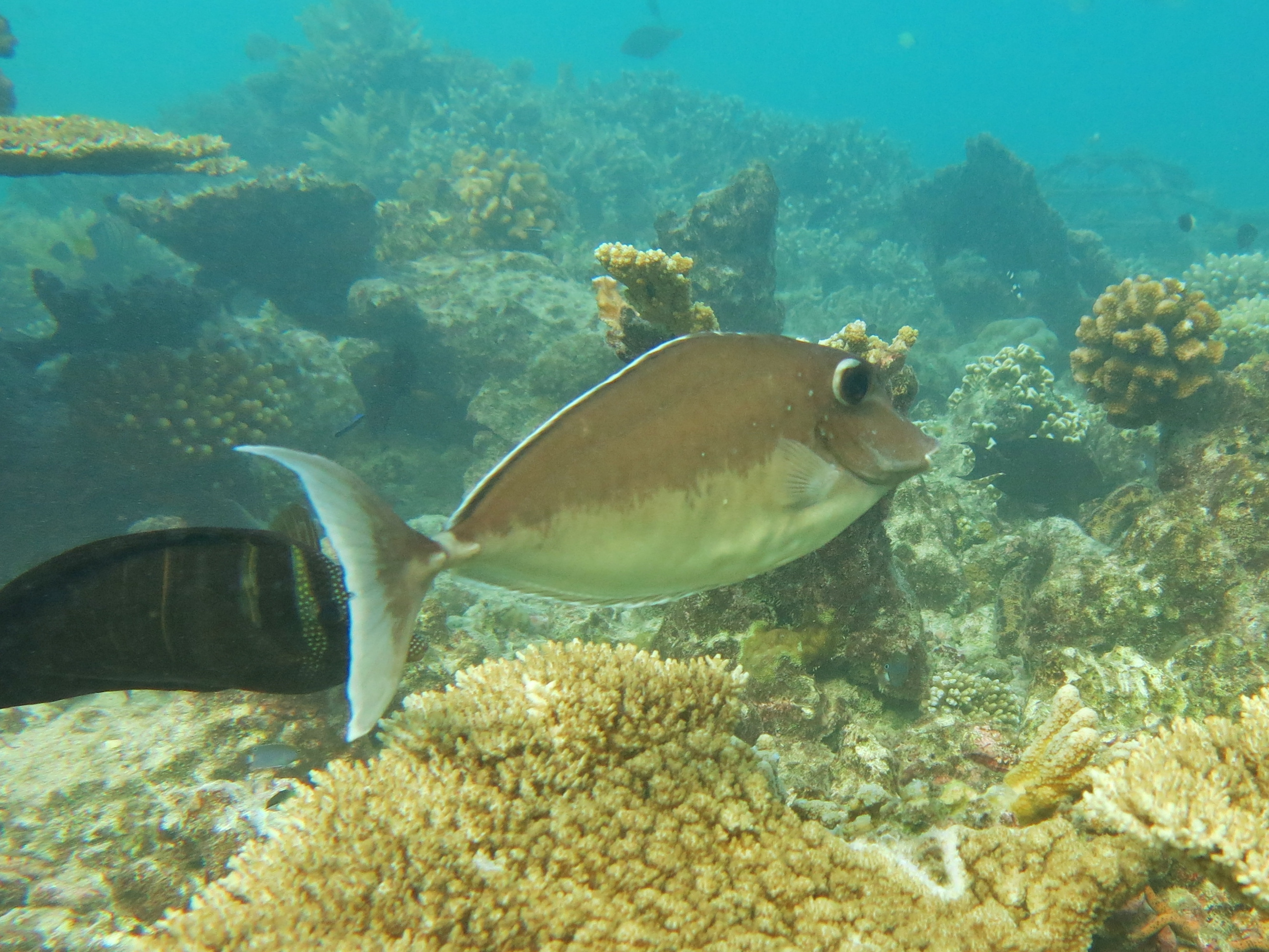 Un jeune nason bossu (Naso brachycentron) aux Maldives (Landaagiraavaru, atoll de Baa).